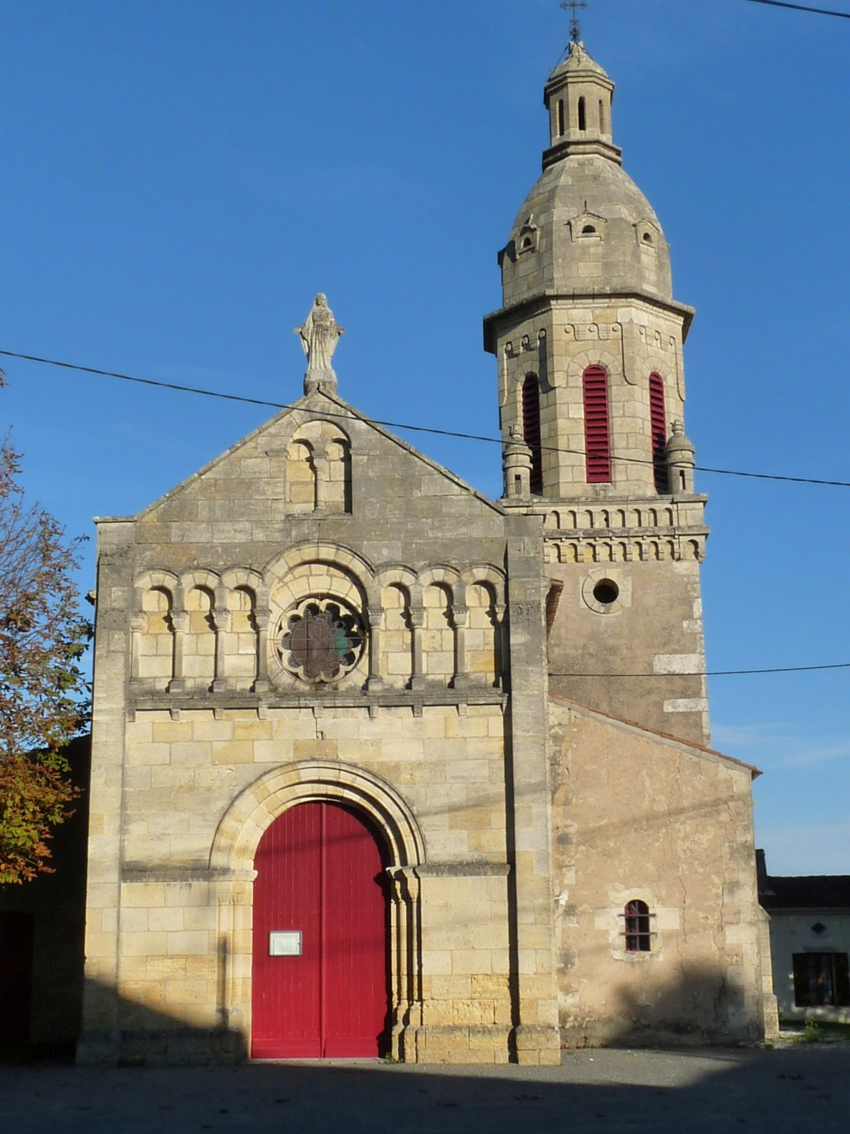 Eglise d'Eyrans, Gironde, France